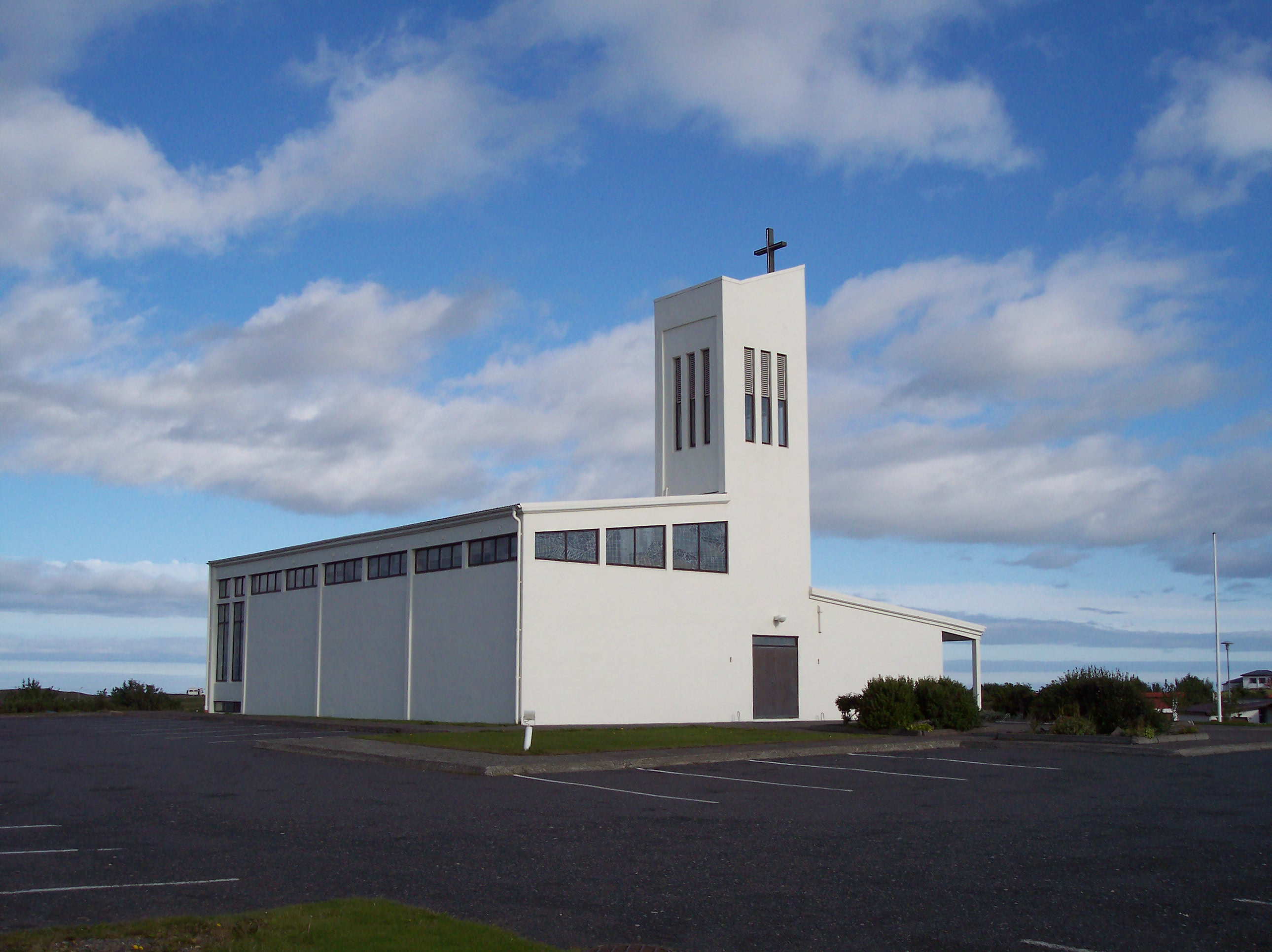 Hafnarkirkja, Höfn í Hornafirði, Iceland.